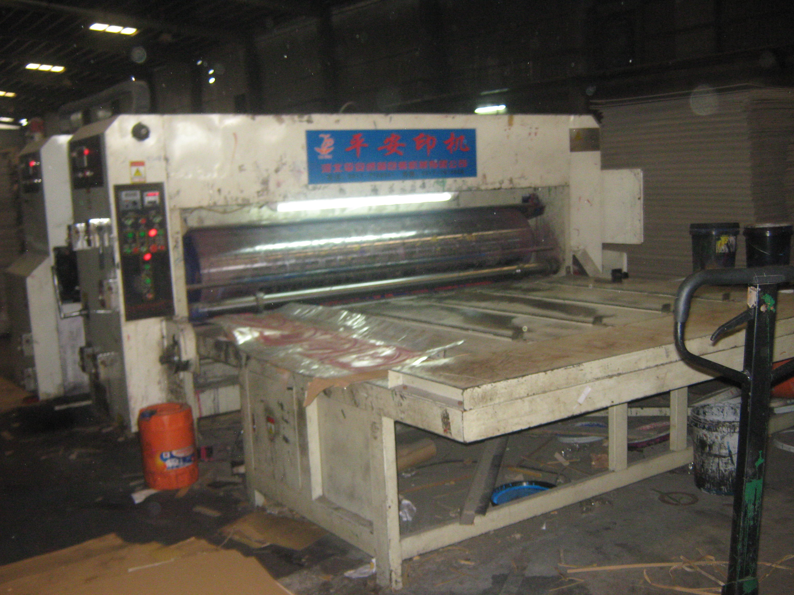 Máy in bao bì (nhìn từ đằng sau).